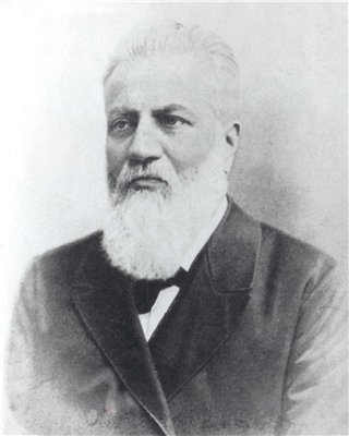 Стефан Михайлович Сольский, киевский городской голова в 1887—1900 годах, заслуженный ординарный профессор Киевской духовной академии.